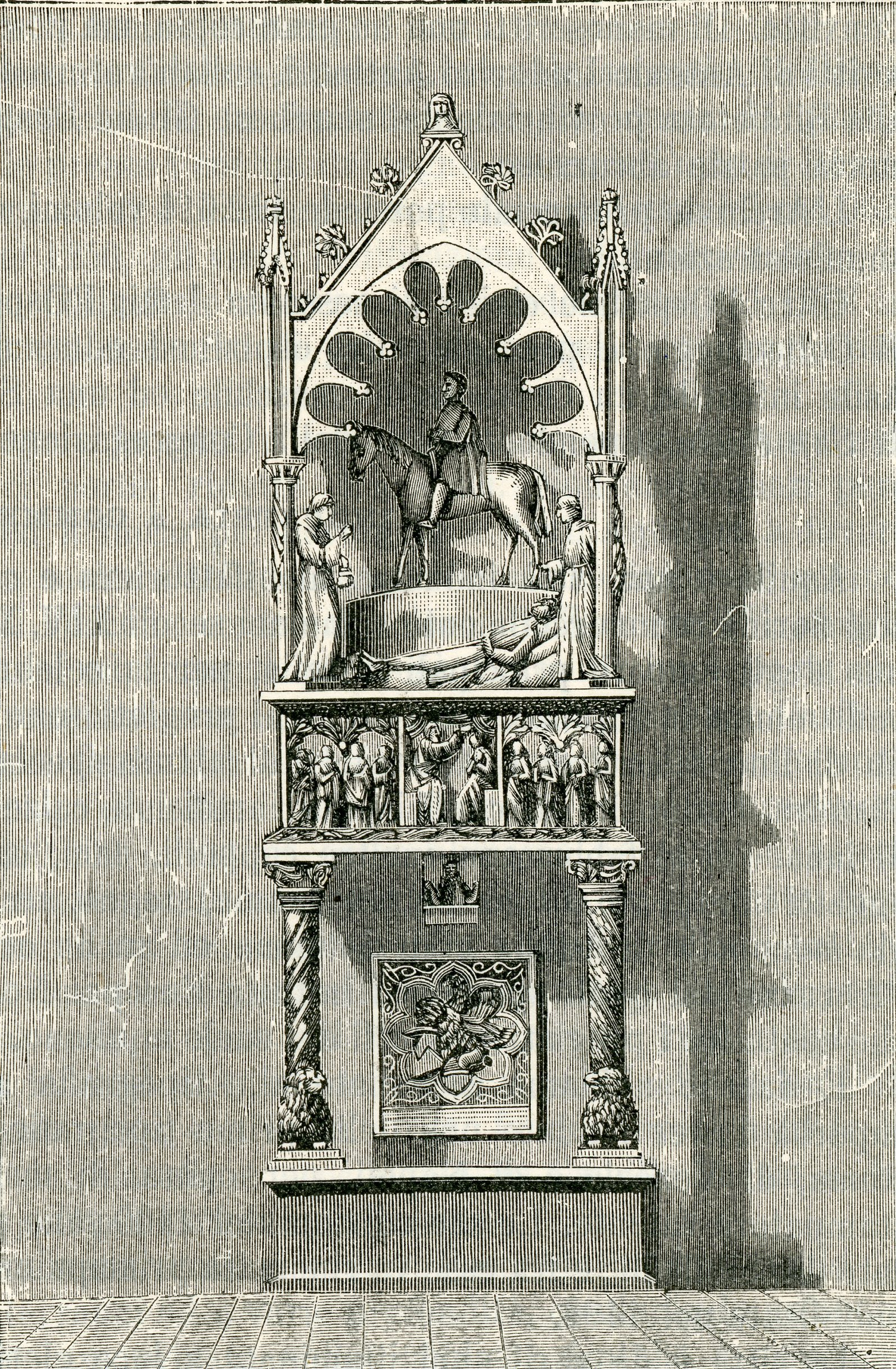 Aquila: monumento alla famiglia Camponeschi nella chiesa di San Giuseppe (incisore anonimo 1899).